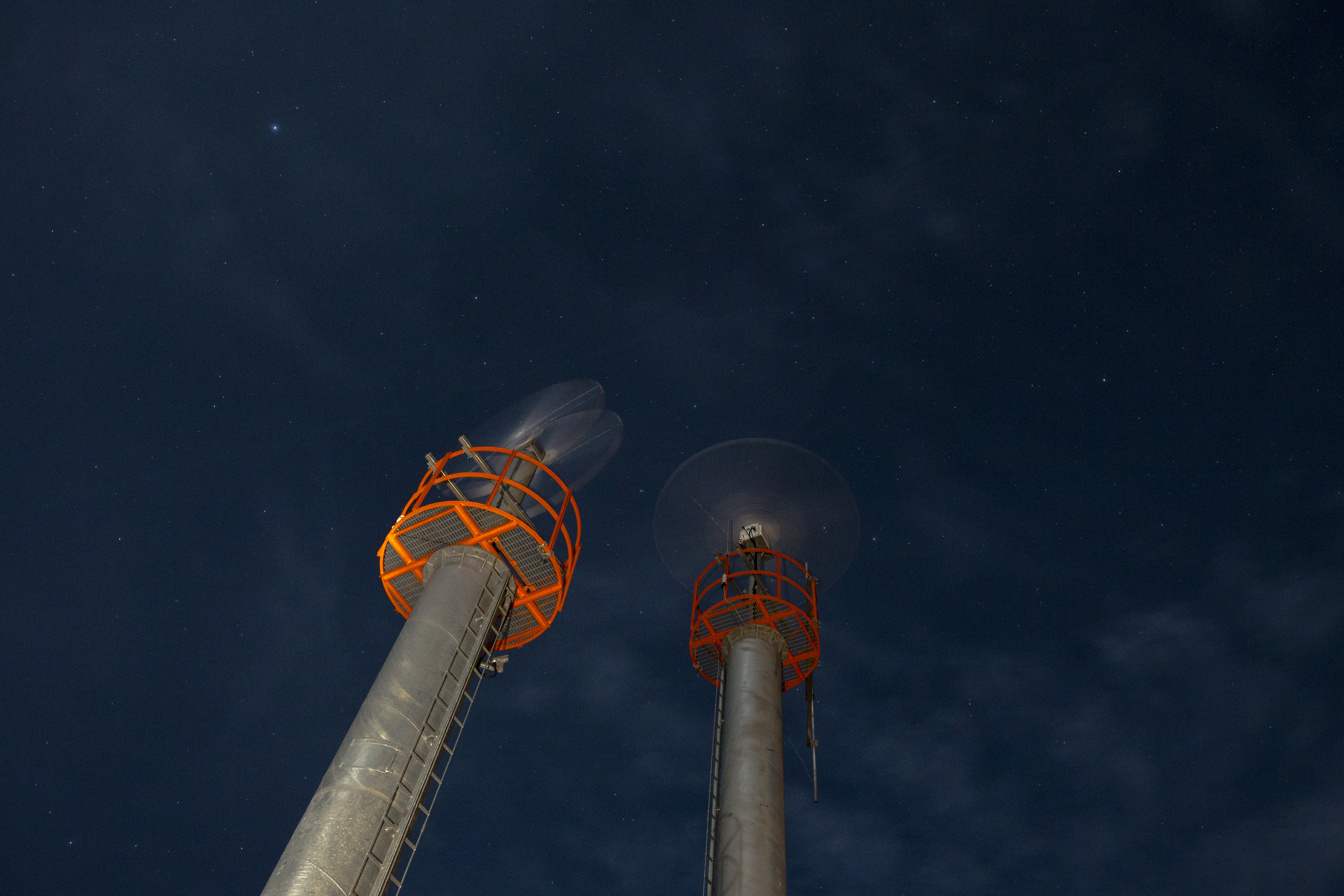 Moodsad linnuradarid (vasakul horisontaal- ning paremal vertikaalradar) võimaldavad jälgida lindude rännet ka ööpimeduses, mil klassikalised vaatlused pole võimalikud. Radaruuringud lubavad saada teavet lindude rändeaktiivsuse, selle fenoloogia, kõrguse ja seoste kohta keskkonnatingimustega. Radarseirega on leidnud kinnitust asjaolu, et lindude öine ränne on aktiivseim tähistaevaga ning on selgunud, et ligikaudu pool kogurändest leiab aset öötundidel. Pildil olevate radaritega seiratakse lindude rännet Tartu Ülikooli Eesti Mereinstituudi välibaasis Kihnus, Eesti Energia AS tellimusel, et välja selgitada ümbritsevate merealade sobivus tuuleenergeetika arendamiseks.